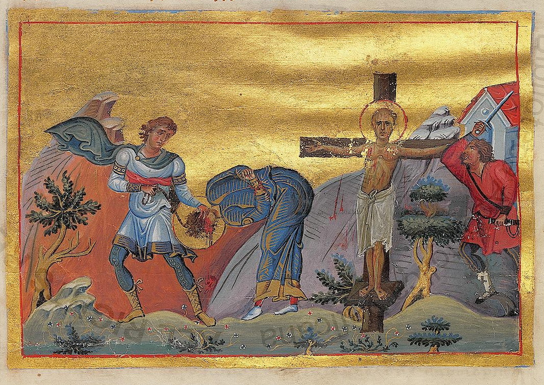 Мучения св. Гемелла. Миниатюра из Минология Василия II. 976-1025 гг. (Vat. gr. 1613. Fol. 235) // Gemellus